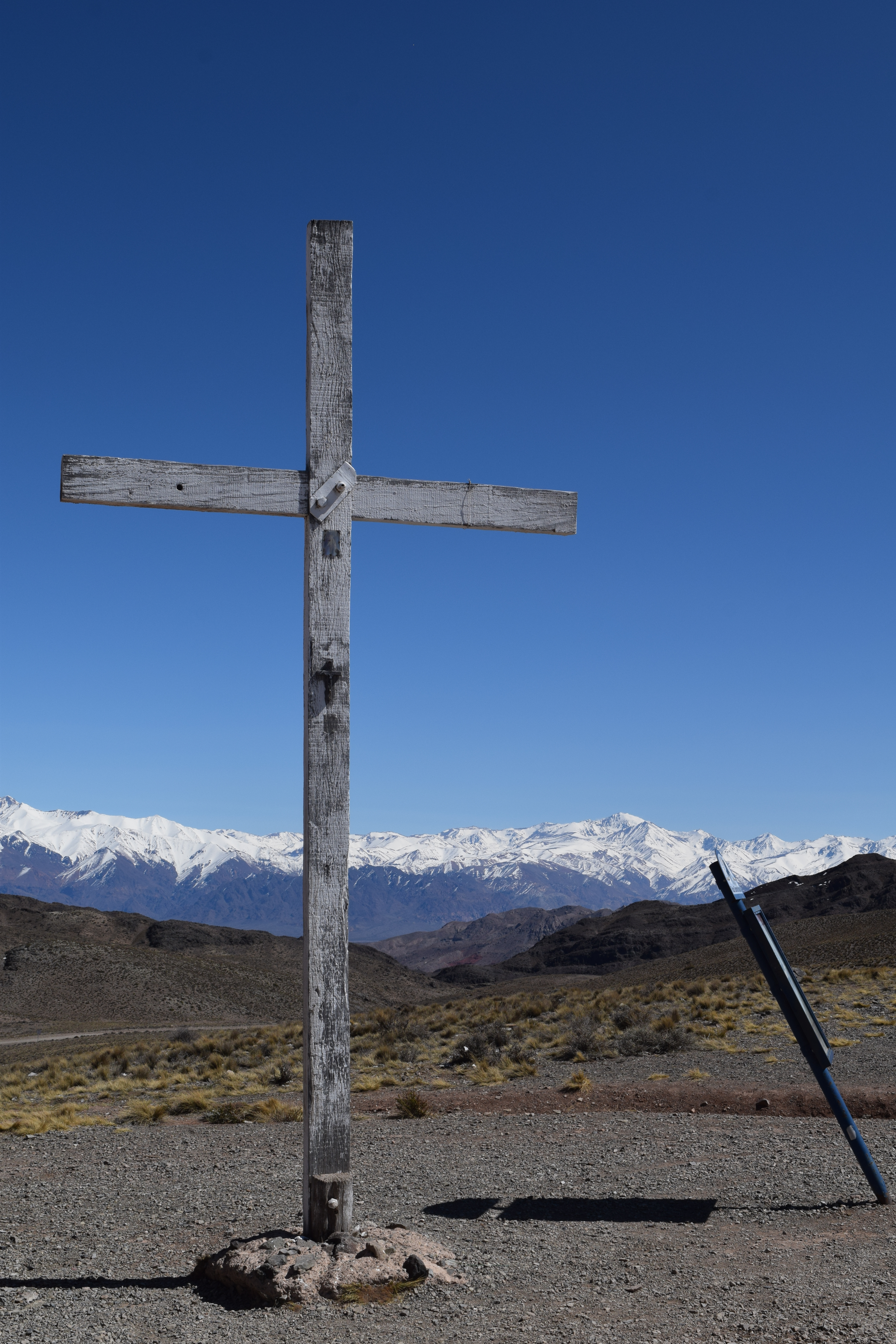 La Cruz de Paramillos en el departamento de Las Heras, Mendoza.